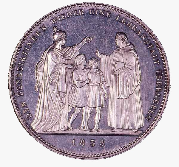 Bayerische Gedenkmünze von 1835 anlässlich der Übergabe des Gymnasiums bei St. Stephan, Augsburg, an die dortigen Benediktiner (Wertseite). Text Bildseite: LUDWIG I KŒNIG VON BAYERN C.VOIGT ZEHN EINE FEINE MARK. Text Wertseite: DEN BENEDIKTINERN WIEDER EINE LEHRANSTALT ÜBERGEBEN 1835.